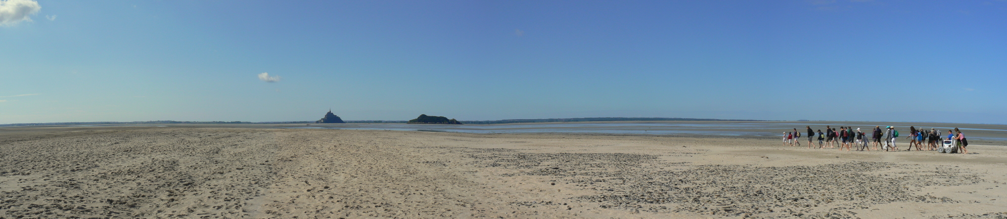 Traversée Baie du Mont-Saint-Michel depuis le Bec d'Andaine Normandie Bretagne Ille et Vilaine Manche